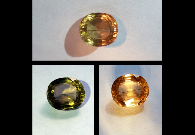 Diaspor mit deutlichem Farbwechsel, 2.92ct, Türkei